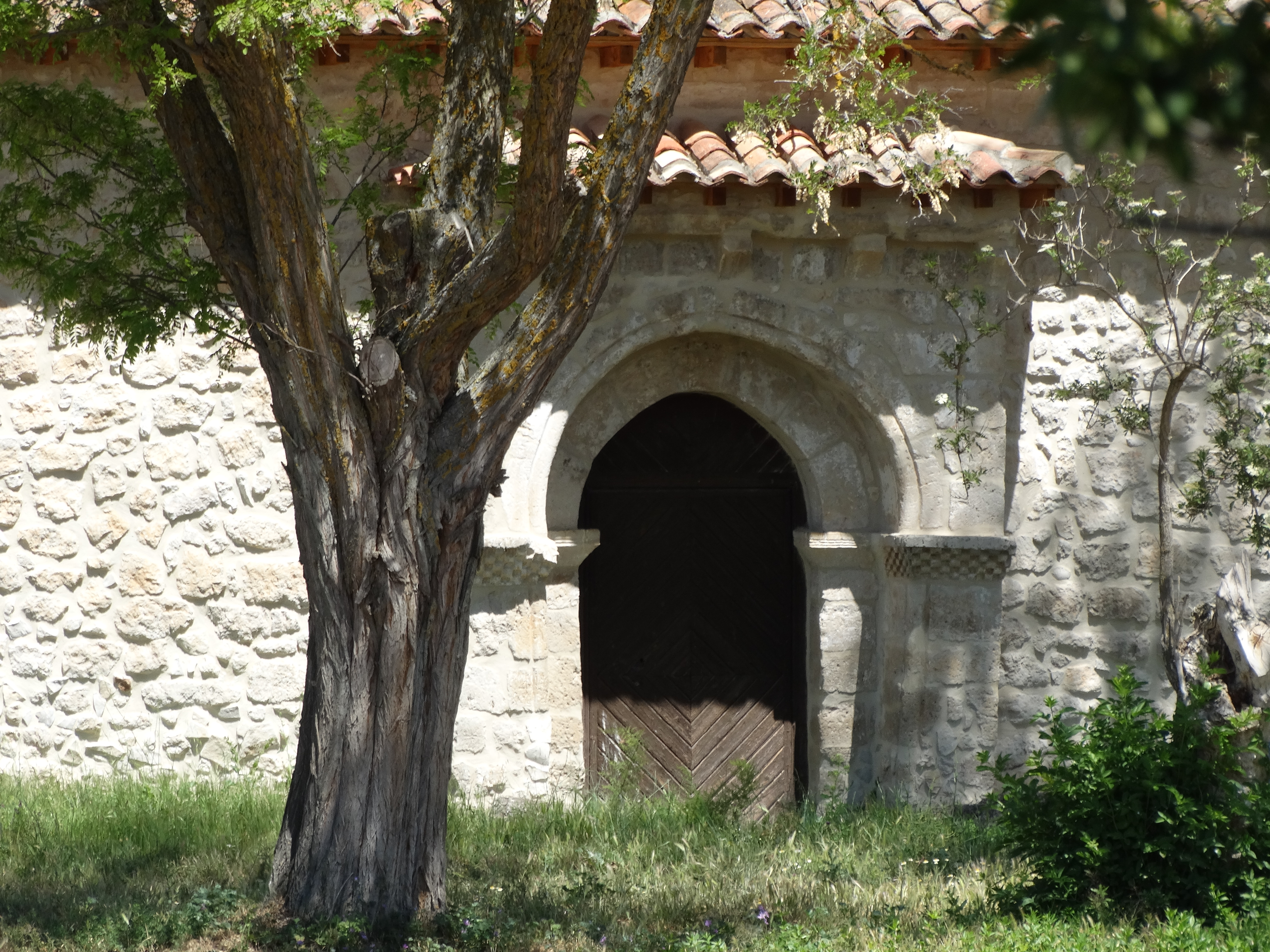 Valladolid, España. Despoblado de Fuentes de Duero. Iglesia románica dedicada a Santiago. Está restaurada. Detalle de la portada románica con arco ligeramente apuntado y tejaroz.